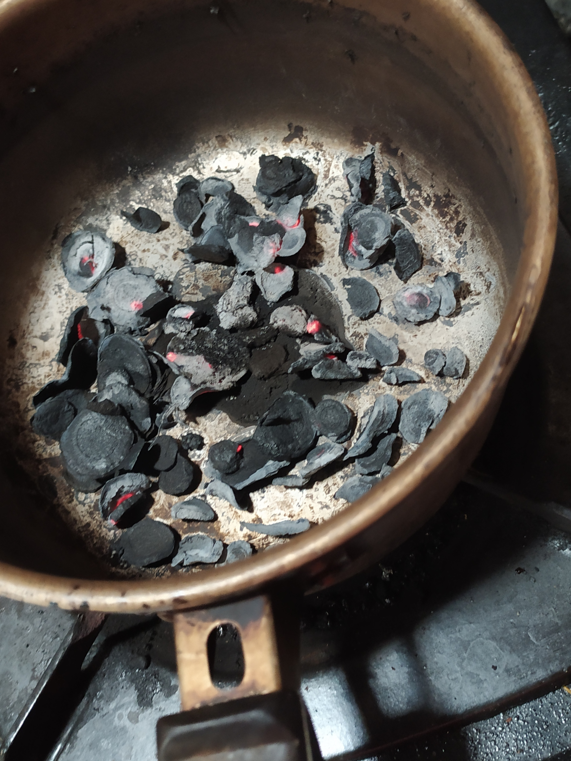 Jawa: Ana pawongan kang ngolah sop lan lali menawa lagi masak. Sakwise ditinggal, sop iku gosong kanthi kaya mangkene praupane.